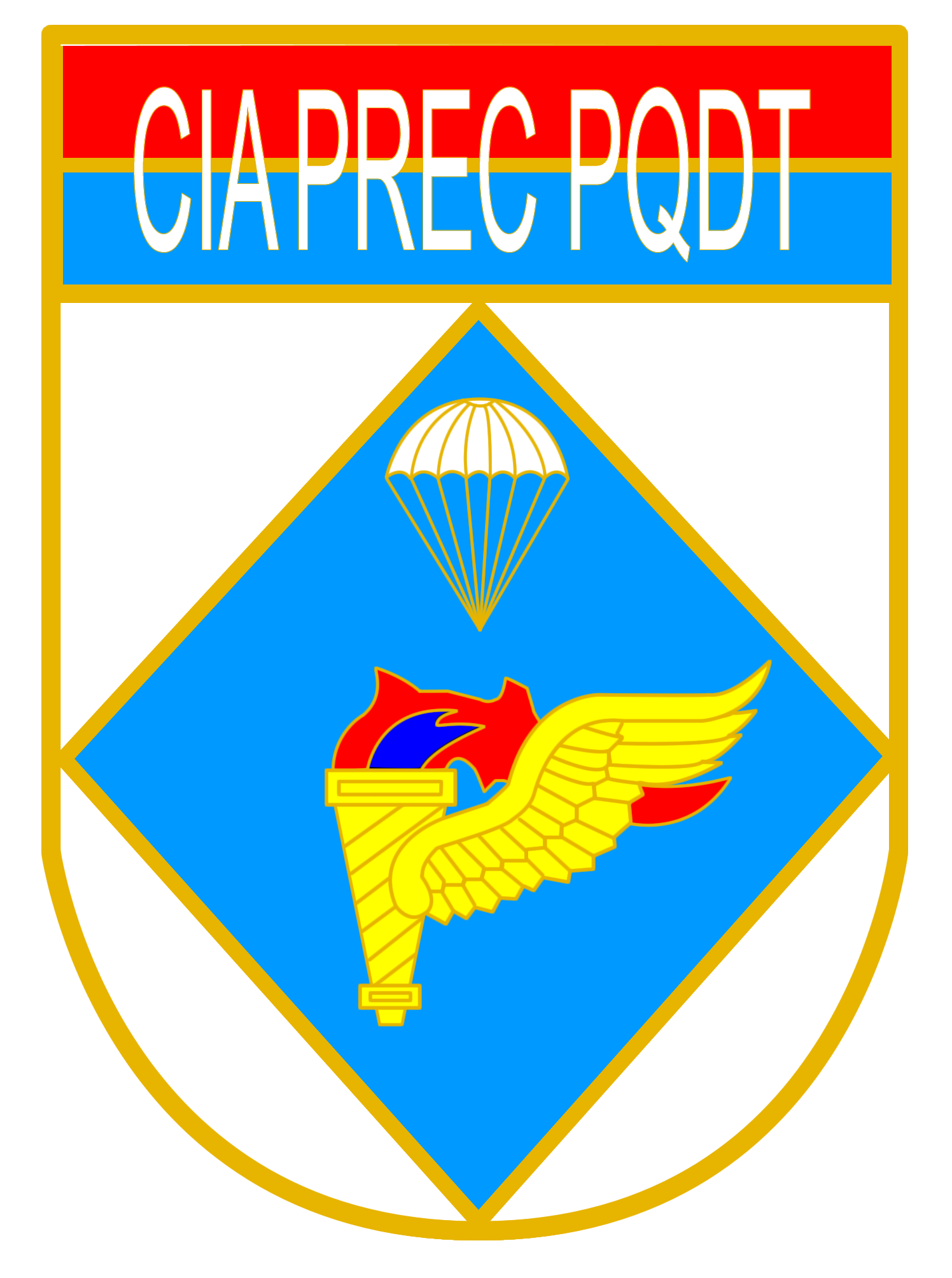 Brasão da Companhia de Precursores Pára-quedista (Cia Prec Pqdt).